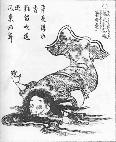 Baika-hyōretsu (梅花氷裂)